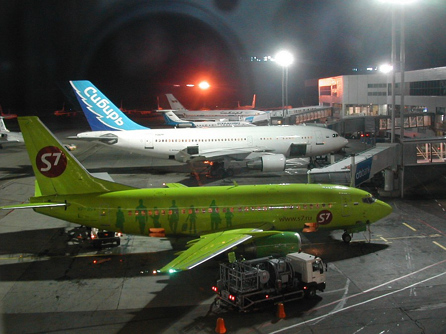 Samoloty linii S7 (Sybir Airlines) na lotnisku Domodiedowo, Moskwa, 22 sierpnia 2005 r.